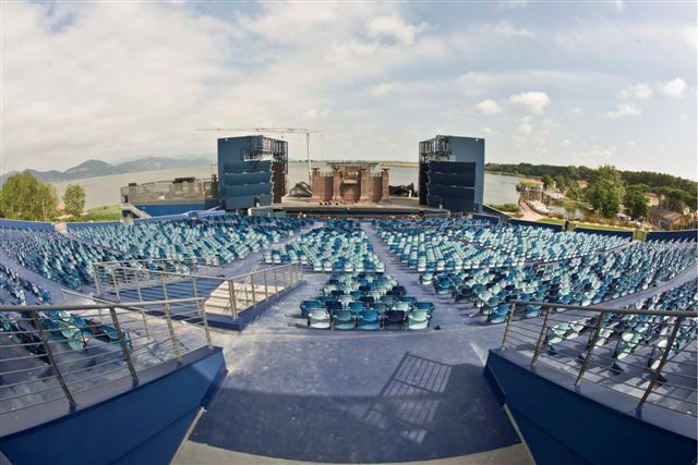 Gran Teatro Giacomo Puccini